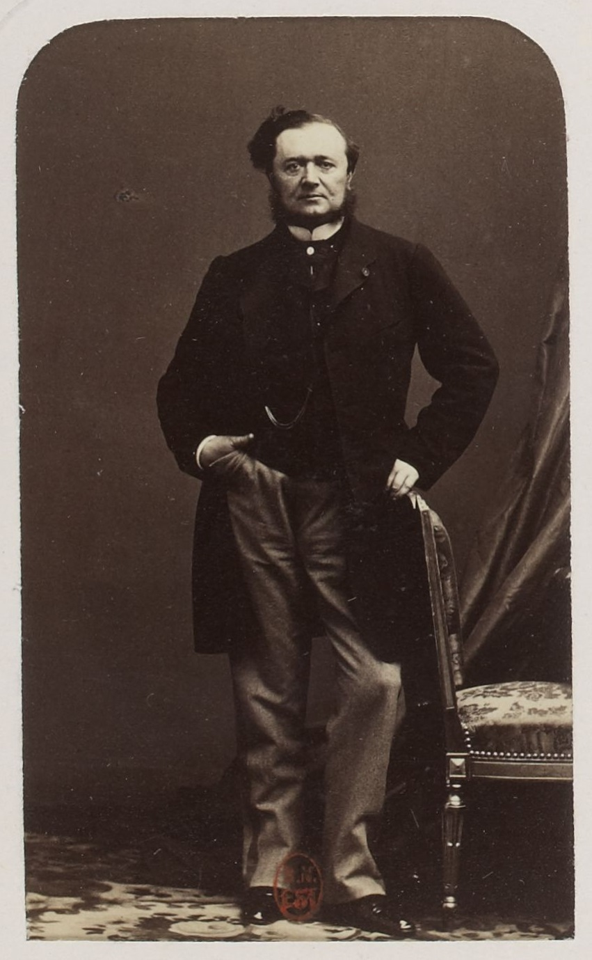 Charlemagne-Émile de Maupas. Photographie incluse dans le recueil Personnalités politiques, militaires et religieuses des années 1850 et 1860, Paris, BnF.